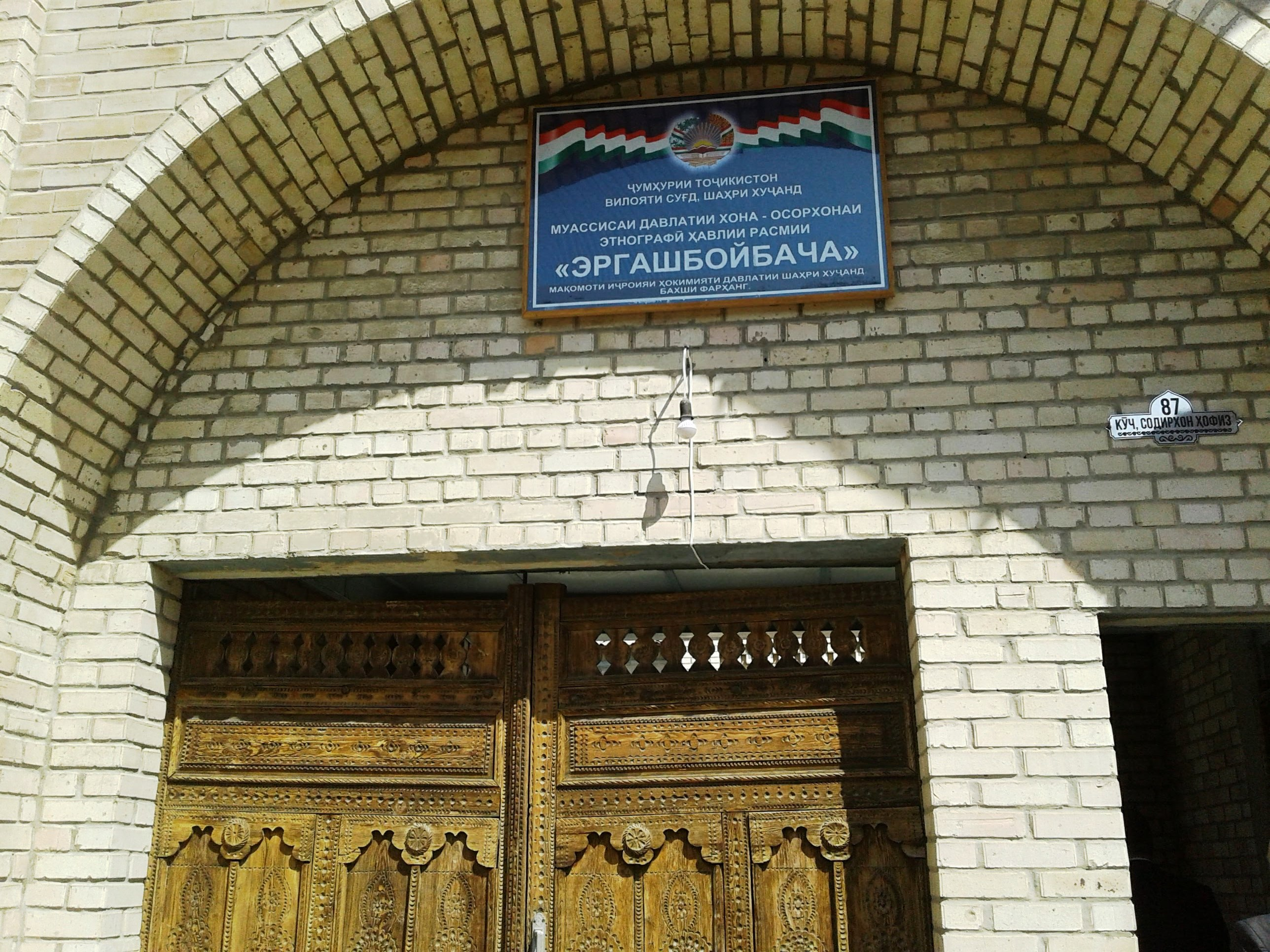 Этнографический дом-музей Эргашбойбача, г. Худжанда Тоҷикӣ: Хона-осорхонаи мардумшиносӣ, ҳавлии Эргашбойбача, ш. Хуҷанд